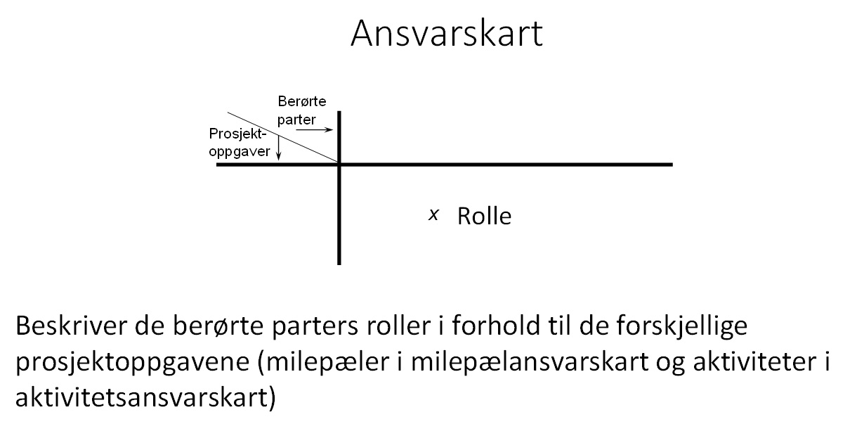 Organiseringsverktøy